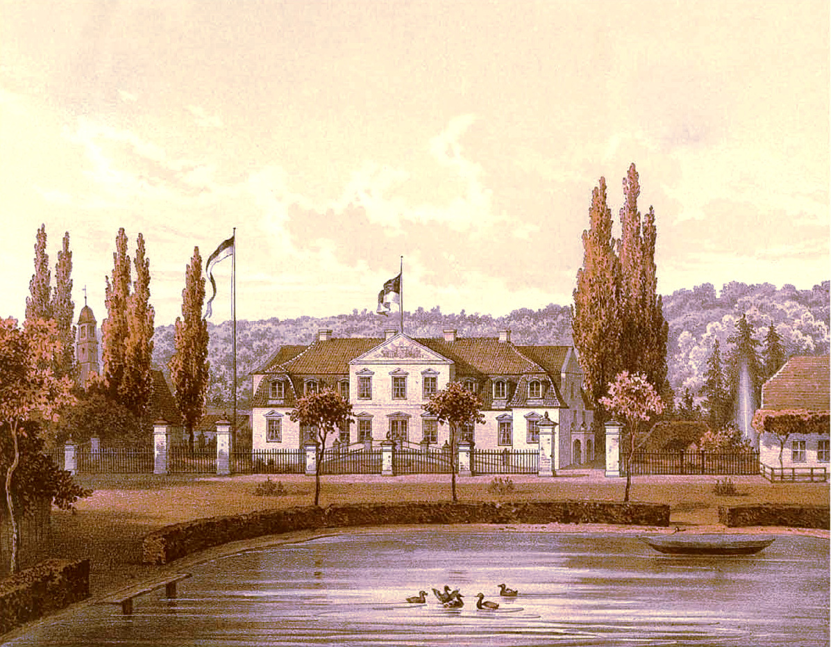 Rittergut Cadinen, Kreis Elbing, Provinz Preußen